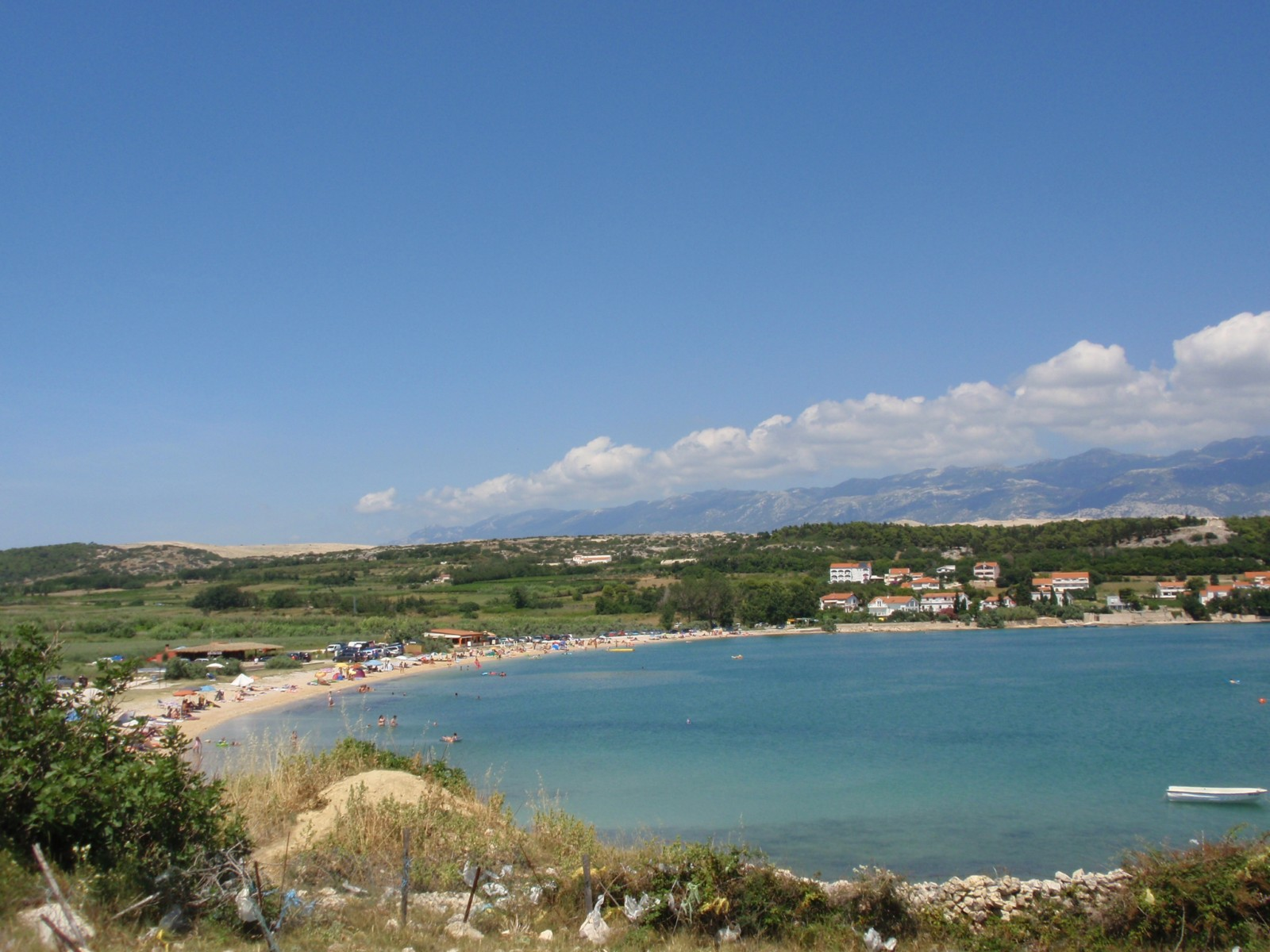 pláž Časka